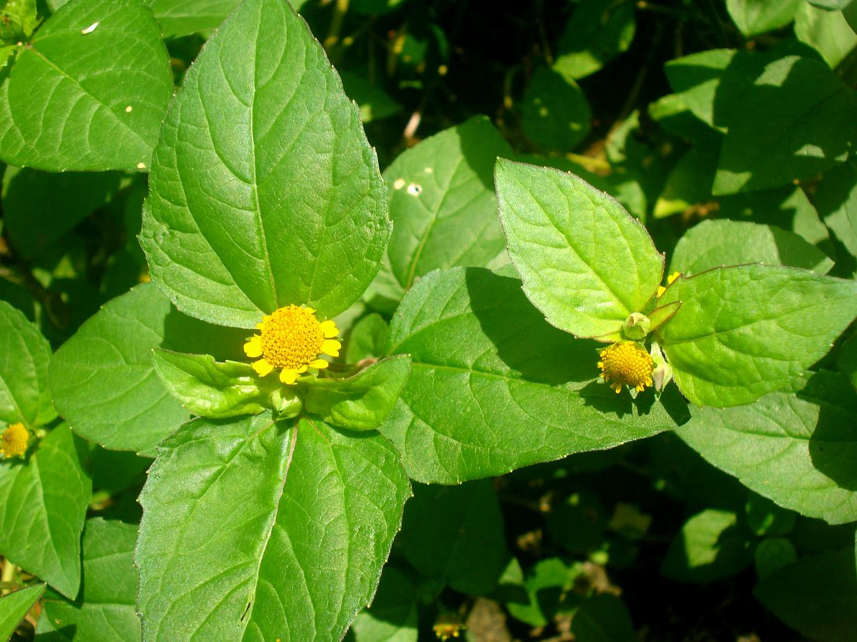 പല്ലുവേദന ചെടി (Acmella oleracea, family Asteraceae) നിലത്ത് പടർന്ന് വളരുന്ന ഈ സസ്യത്തിന്റെ പൂവ് ഔഷധ ഗുണമുള്ളതാണ്. മഞ്ഞ നിറമുള്ള, ഒരു കമ്മൽ പോലെയുള്ള ഈ പൂവ് വായിലിട്ട് ചവച്ചാൽ ഗ്രാമ്പുവിന്റെ രുചിയാണ്. പല്ല് വേദനയുള്ളപ്പോൾ ഈ പൂവിലൊന്ന് പറിച്ചെടുത്ത് വേദനയുള്ള ഭാഗത്ത് കടിച്ചുപിടിച്ചാൽ ധാരാളം ഉമിനീർ വരികയും ഒപ്പം വേദന മാറുകയും ചെയ്യും. പൂവിന്റെ ഔഷധപ്രാധാന്യം മനസ്സിലാക്കിയ നാട്ടിൻപുറത്തുകാർ ചെടി നശിക്കാതെ സംരക്ഷിക്കാറുണ്ട്.